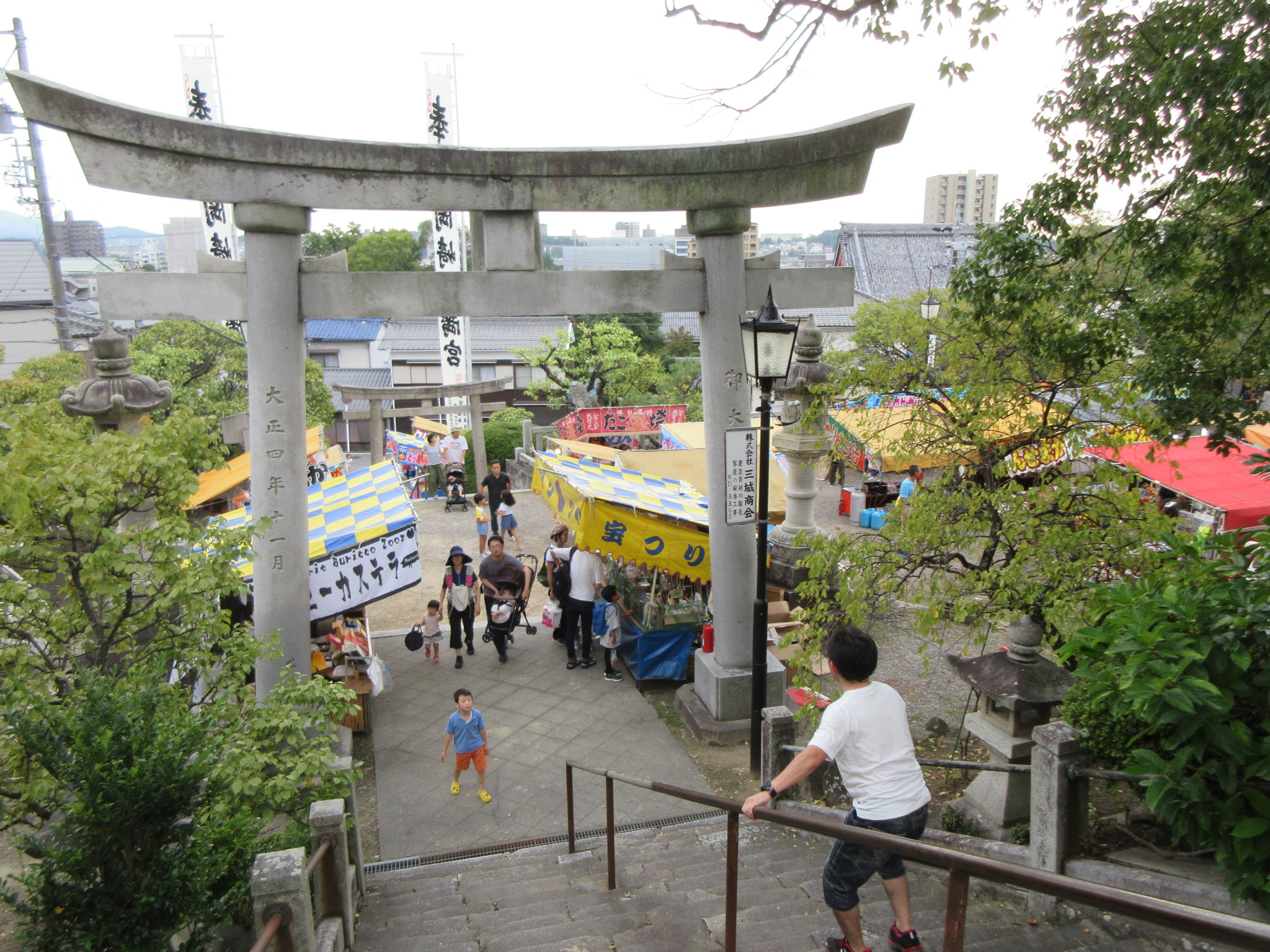 岡崎天満宮天神祭（岡崎市中町）